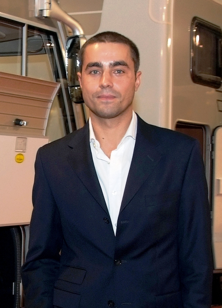 Ricardo Pereira, Portuguese actor, at Exponor.